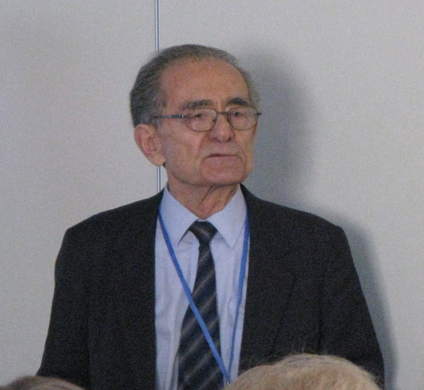 Marian Taniewski w trakcie wykładu